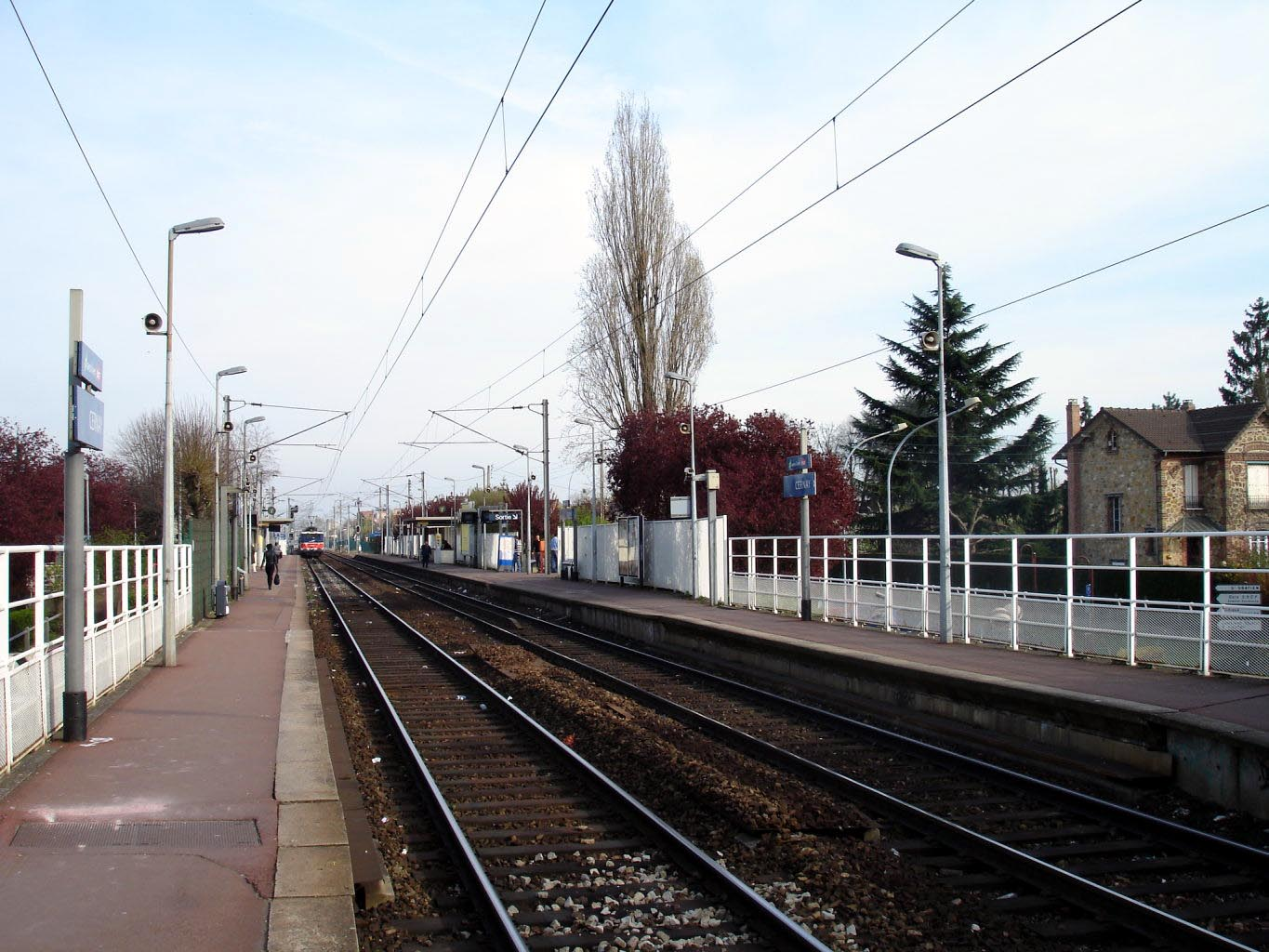 Gare de Cernay à Ermont (Val-d'Oise), France. Photo personnelle de Clicsouris.